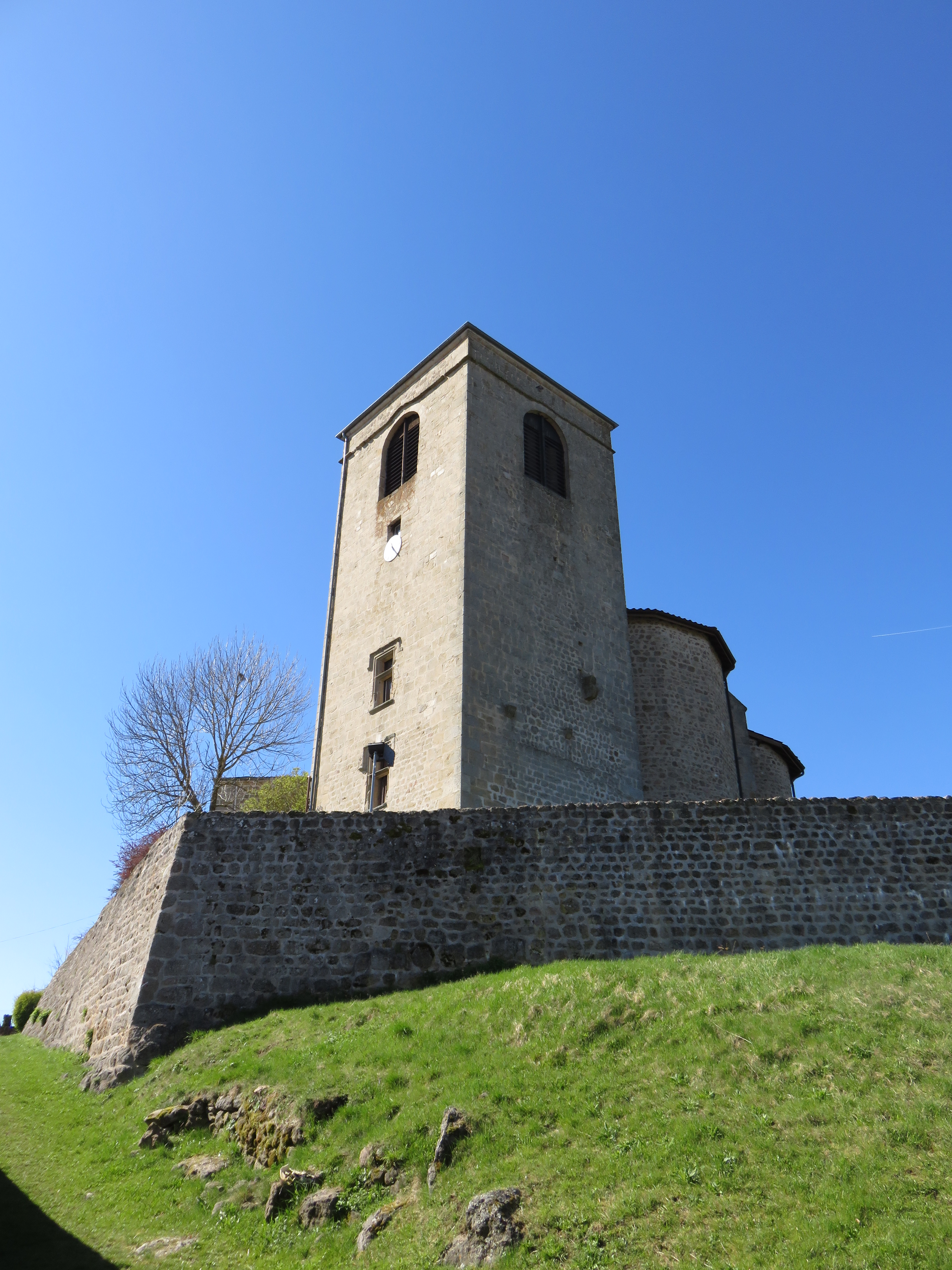 Clocher de l'église de l'Immaculée-Conception de Leignec à Merle-Leignec (Loire, France).